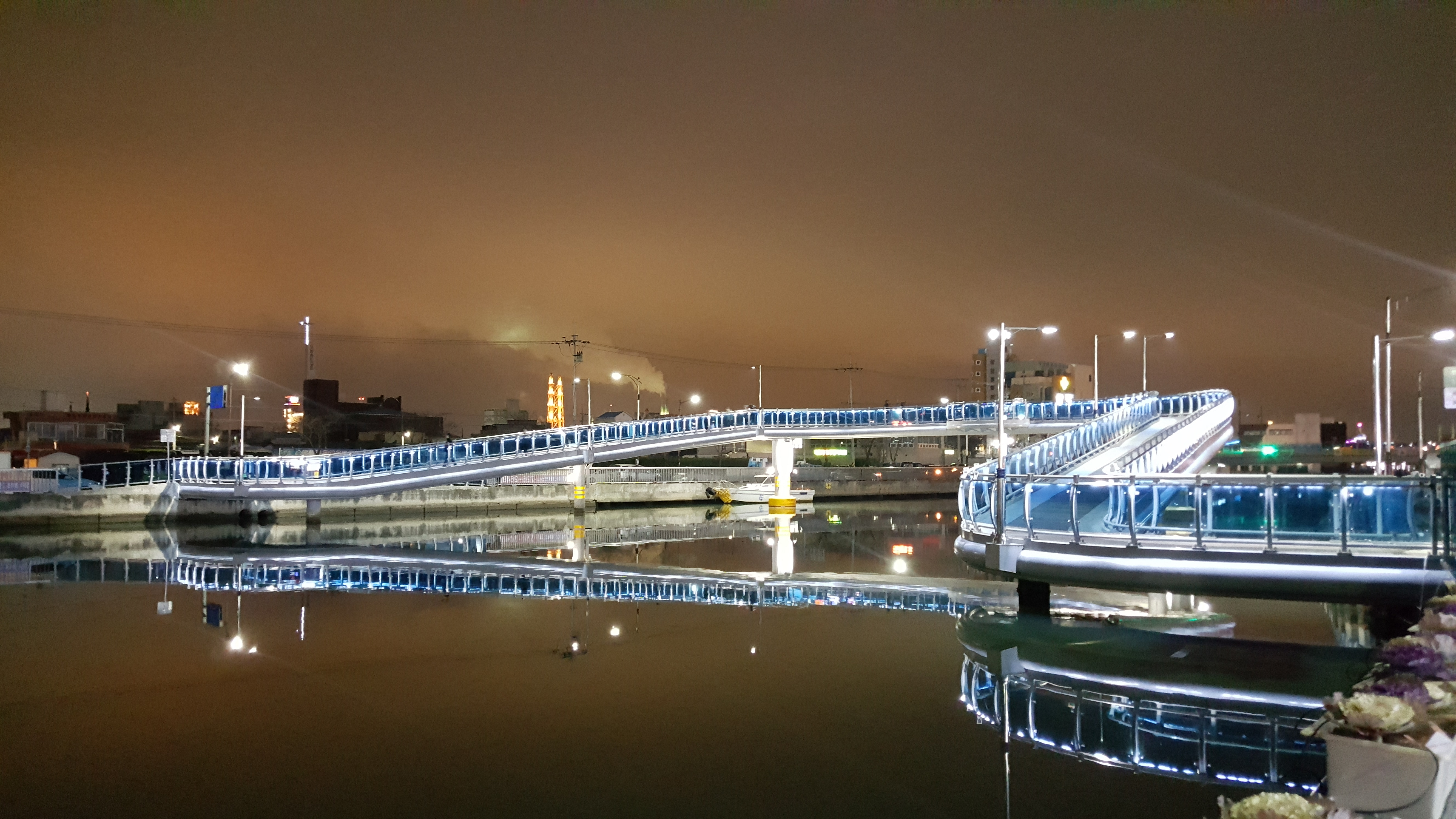 2017년 1월 포항운하. 다리의 이름은 우짤랑교이다.